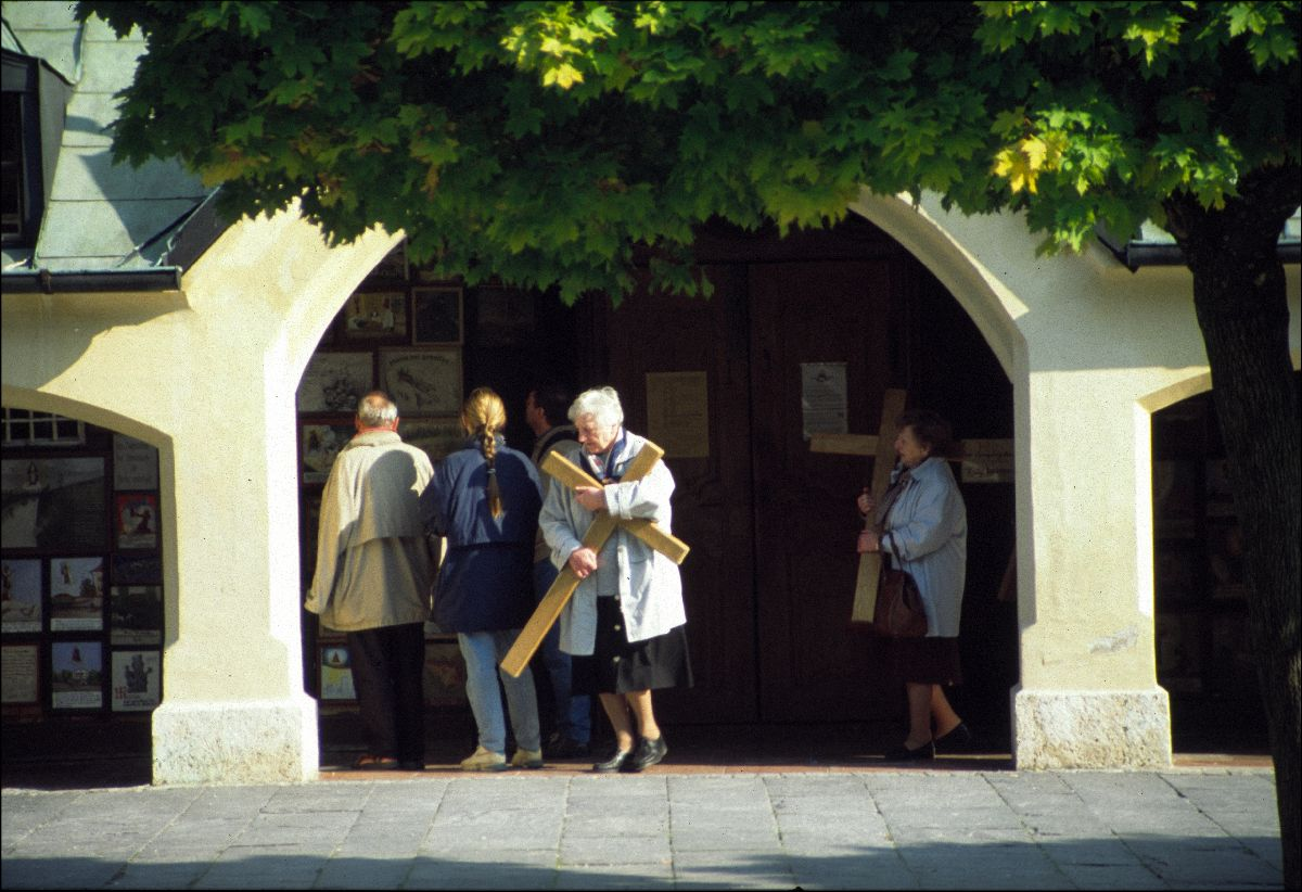 Kreuze werden um die Kapelle getragen